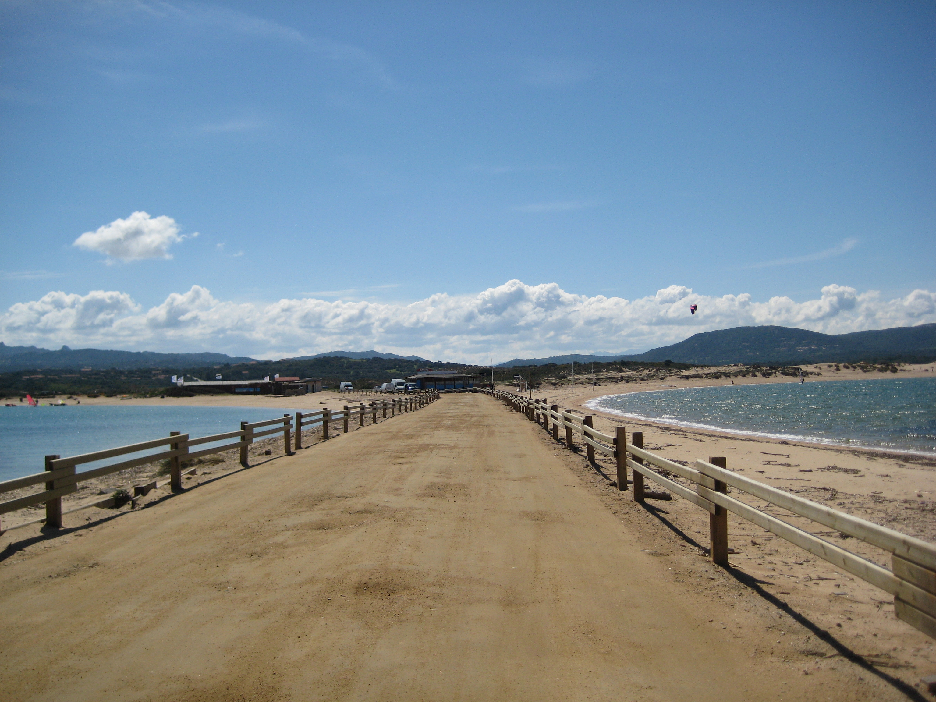 Foto verso terra con alle spalle l'Isola dei Gabbiani. A sinistra Porto Pollo, a destra i laghetti.